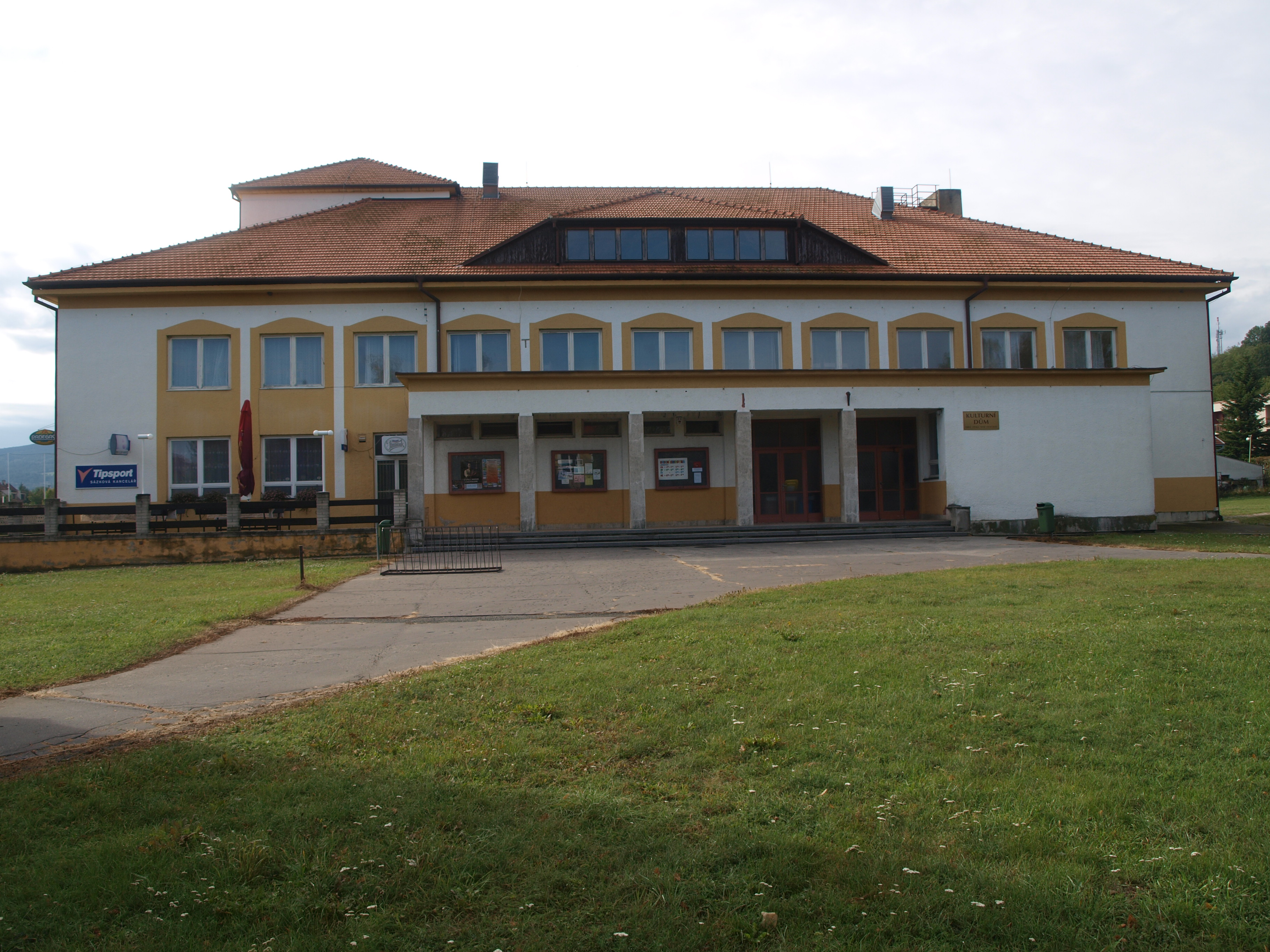 Velká nad Veličkou, kulturní dům